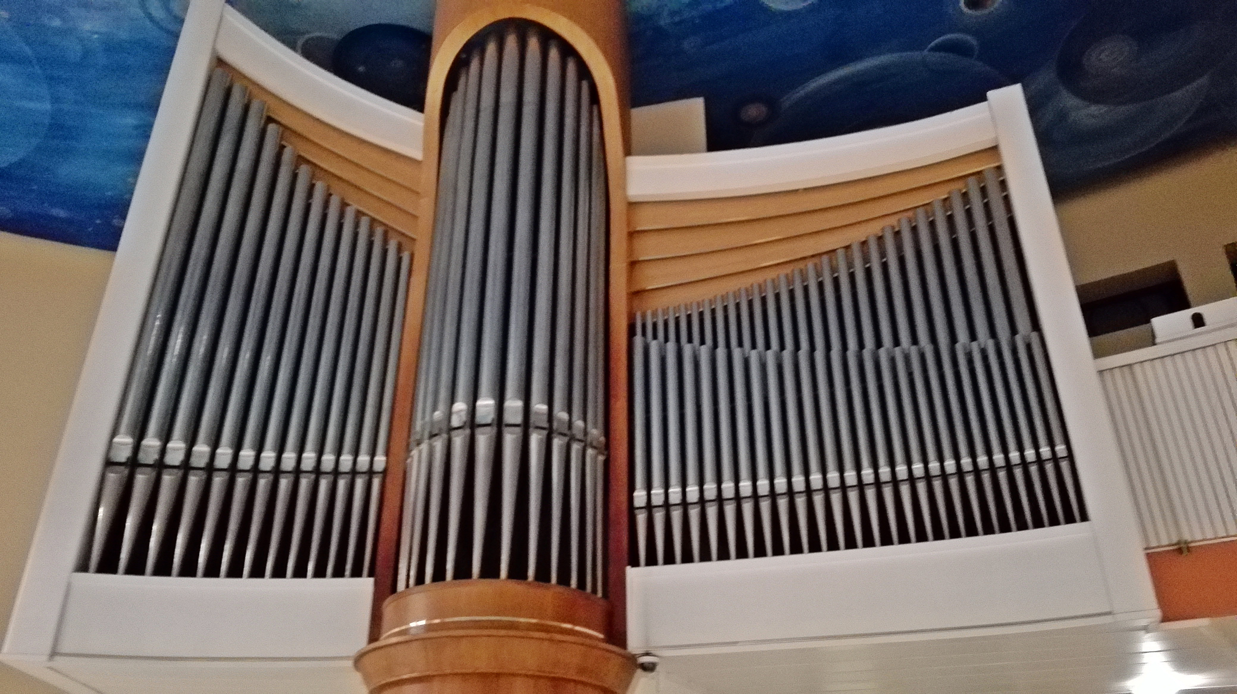 Organy